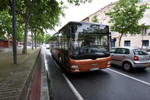 Bus Albibus Man's Lion City Prise Place du Vigan.